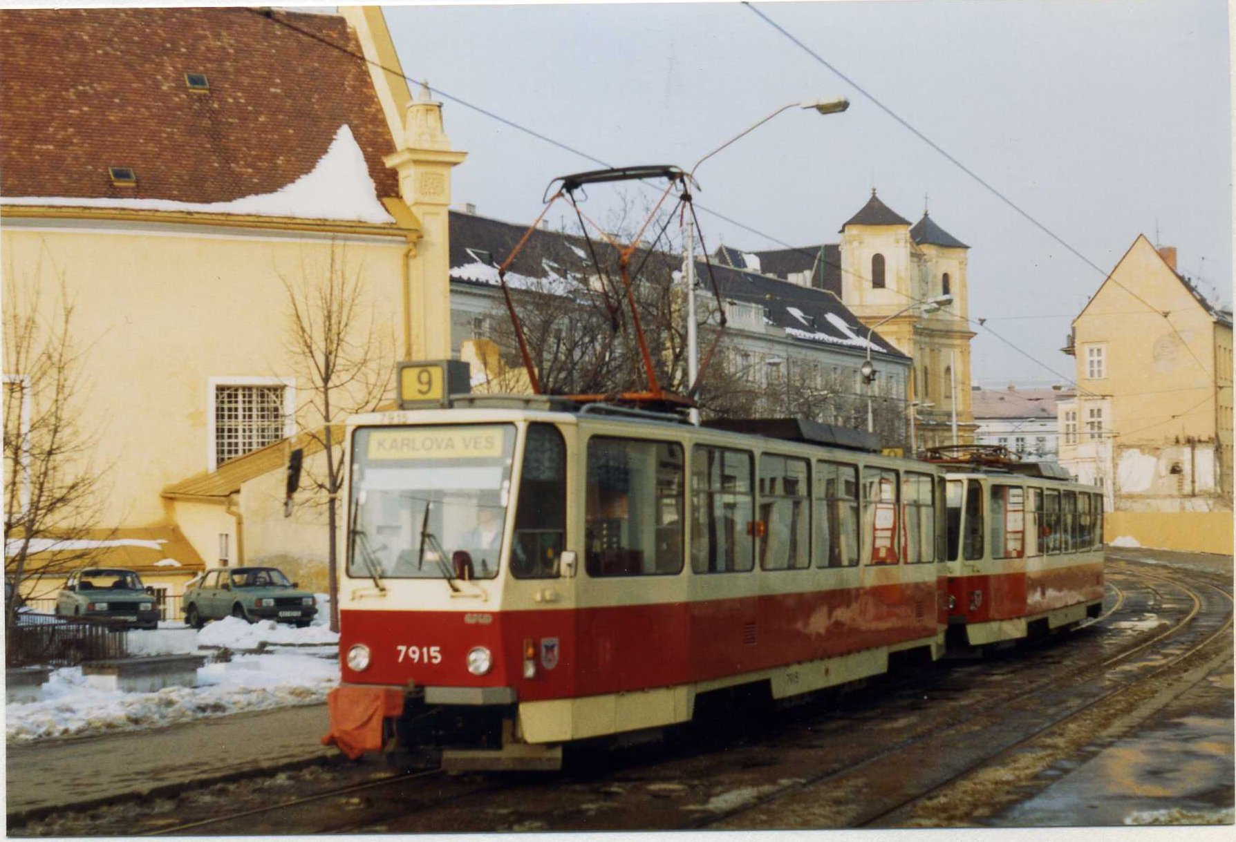 Bratislava Tatra T6A5 Tram 7915, Linka 9 March 1993